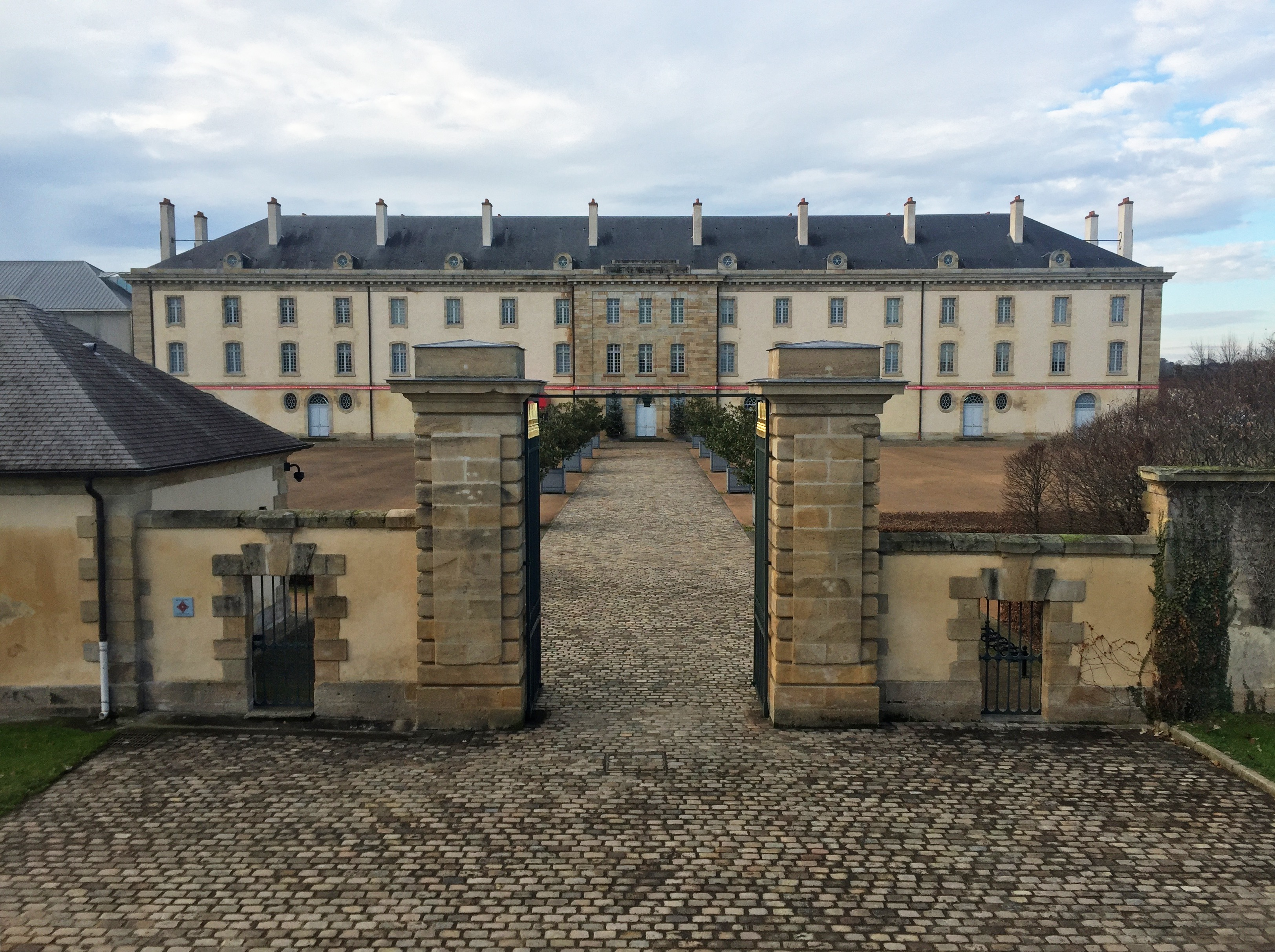 Centre national du costume de scène de Moulins en décembre 2015.